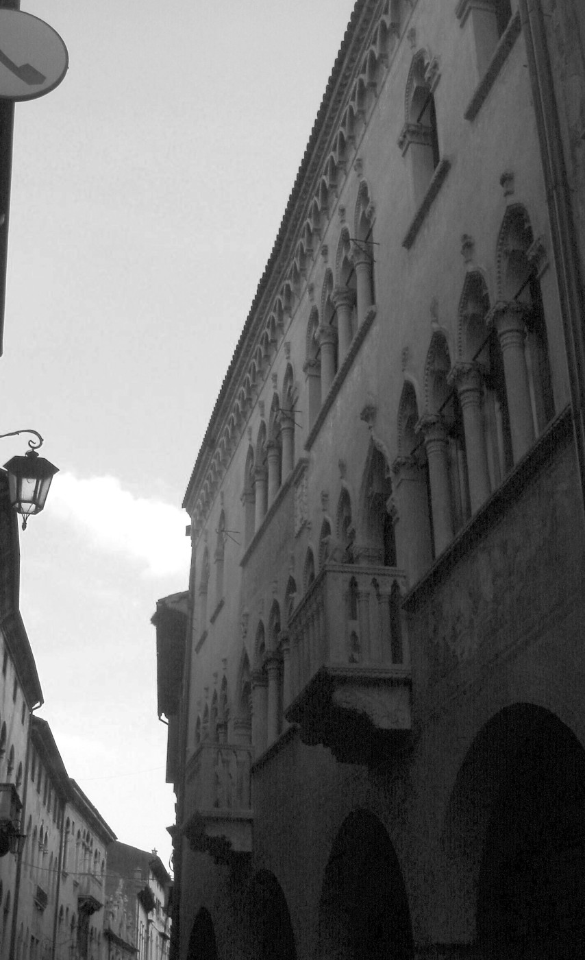 Serravalle di Vittorio Veneto (Treviso): facciata di Palazzo Racola de Fontanellis Troyer (XV secolo).